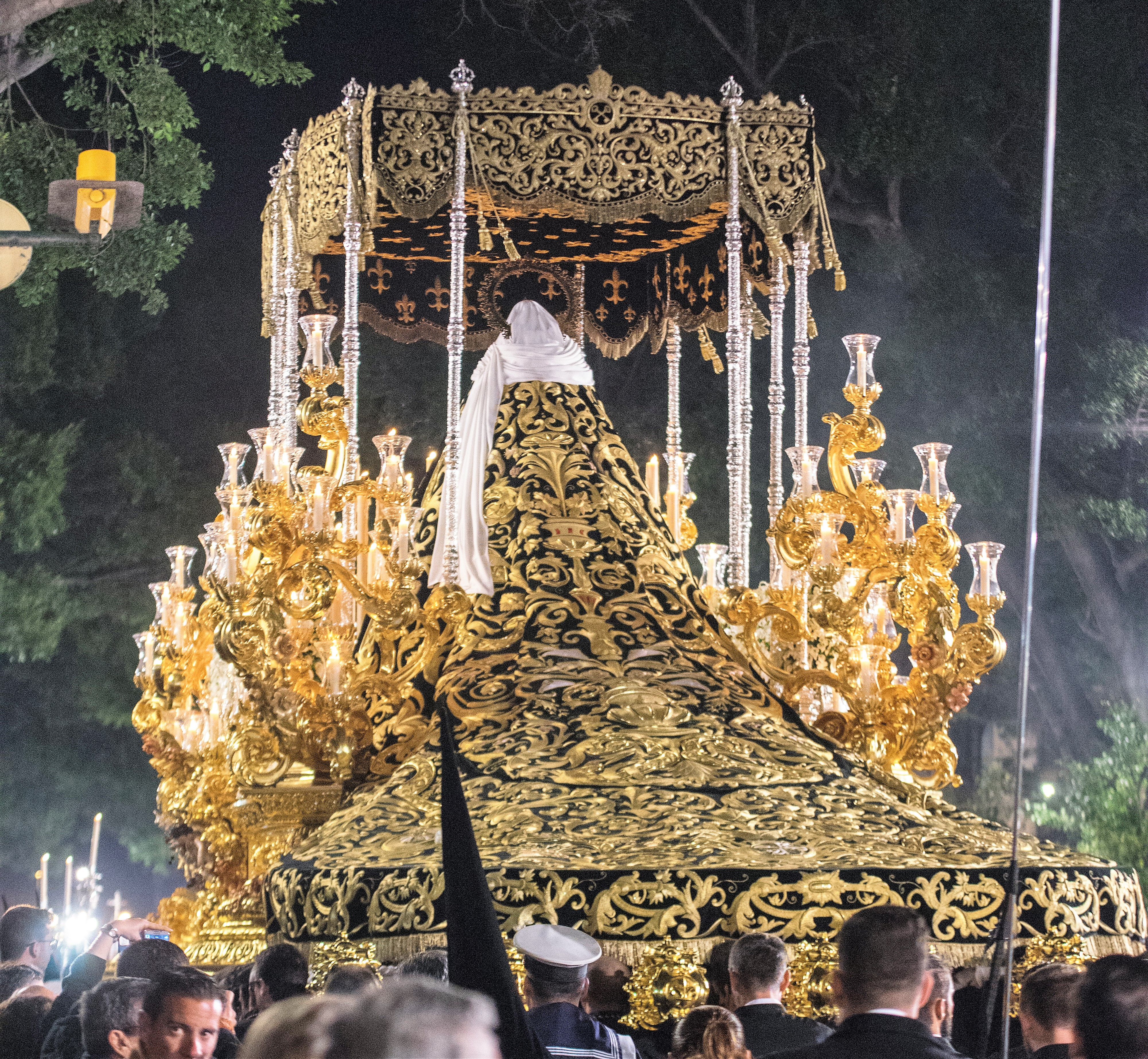 Manto de la Pontificia y Real Congregación del Santísimo Cristo de la Buena Muerte y Ánimas y Nuestra Señora de la Soledad This is a photography of a Folklore festival in Spain (Wikidata id Q9075883).